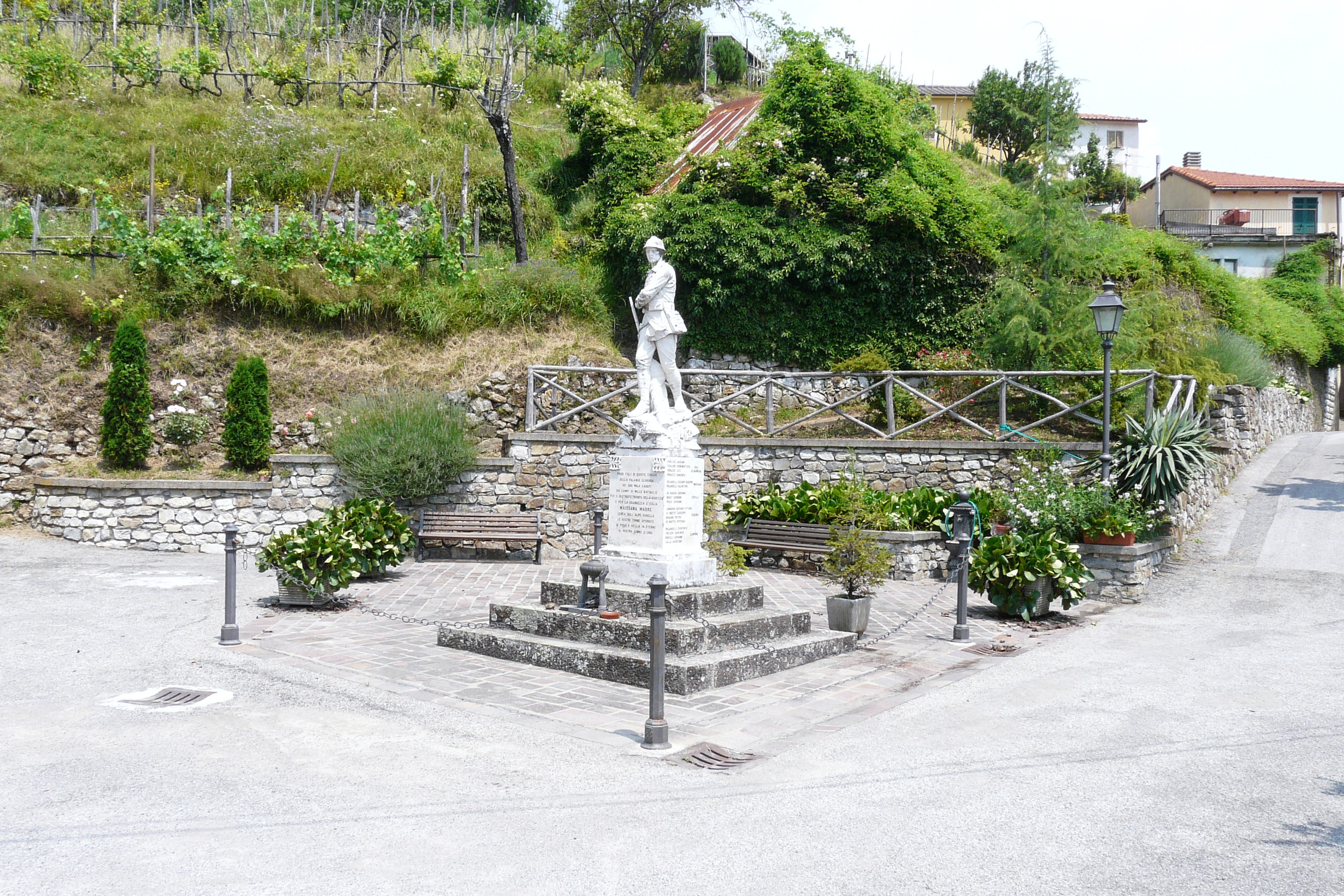 Monumento ai caduti di Maissana, Liguria, Italia